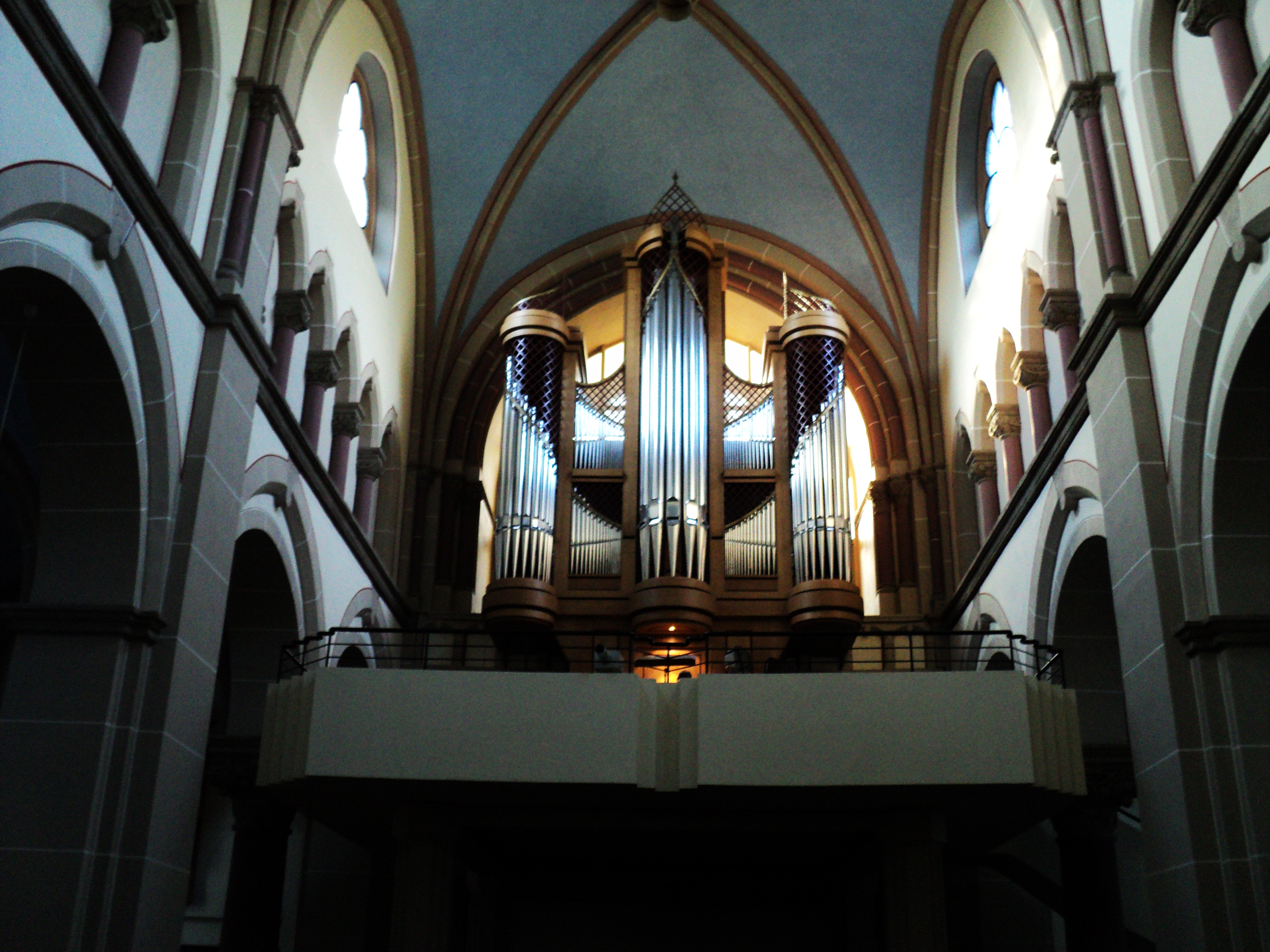 Klais-Orgel in St. Joachim in Düren, Nordrhein-Westfalen von 1992.